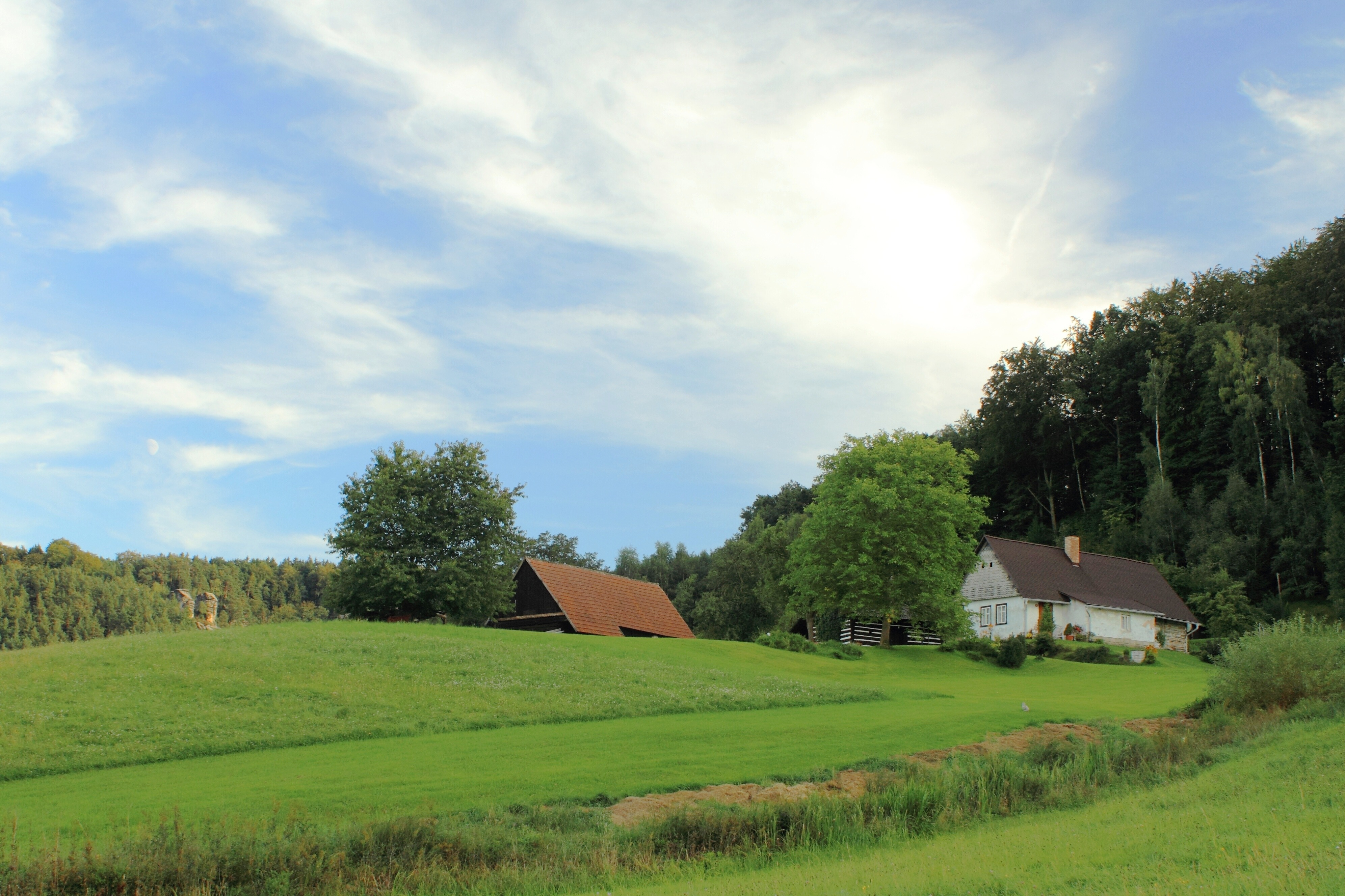 Příhrazy